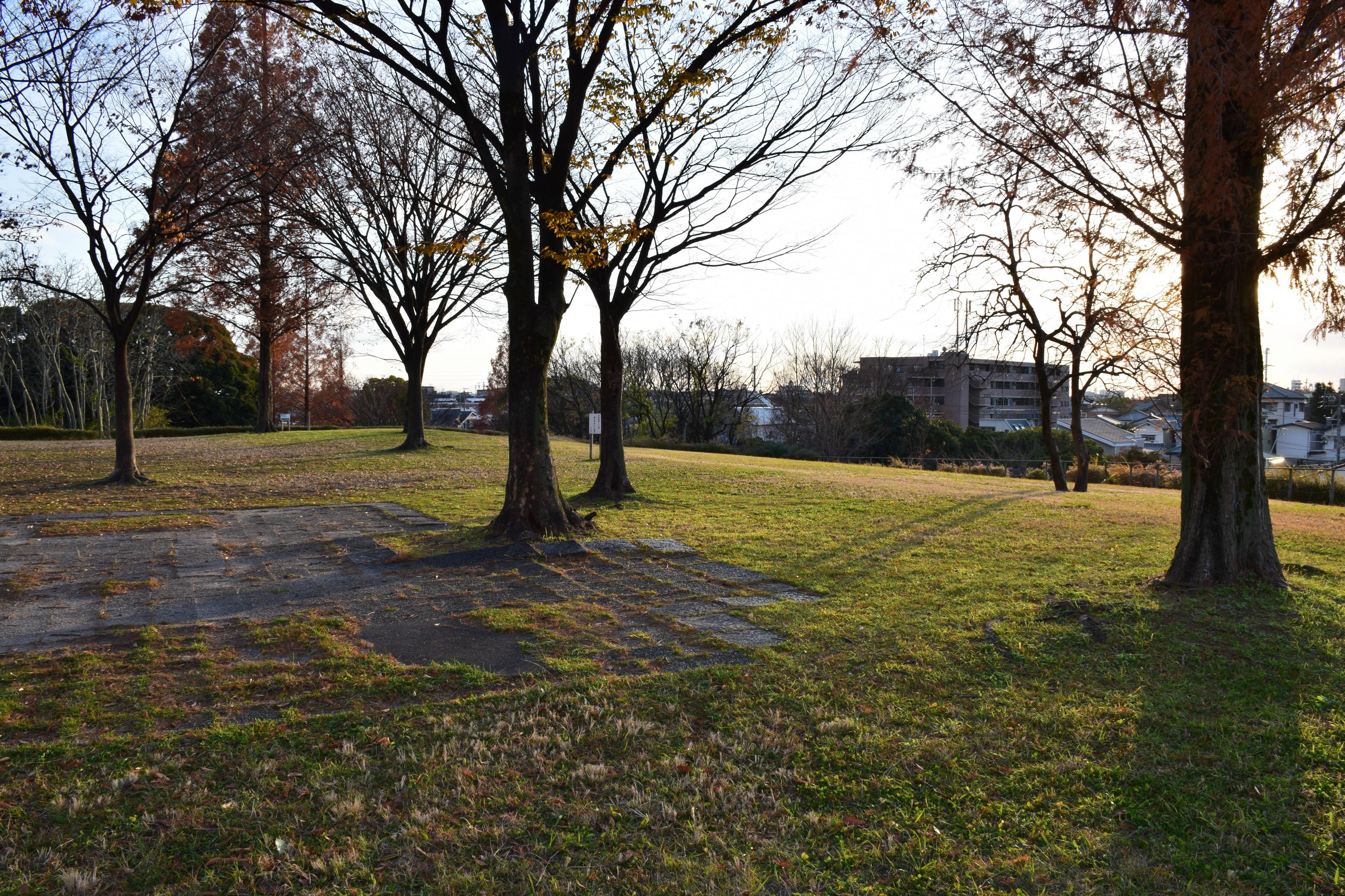 笠寺公園内